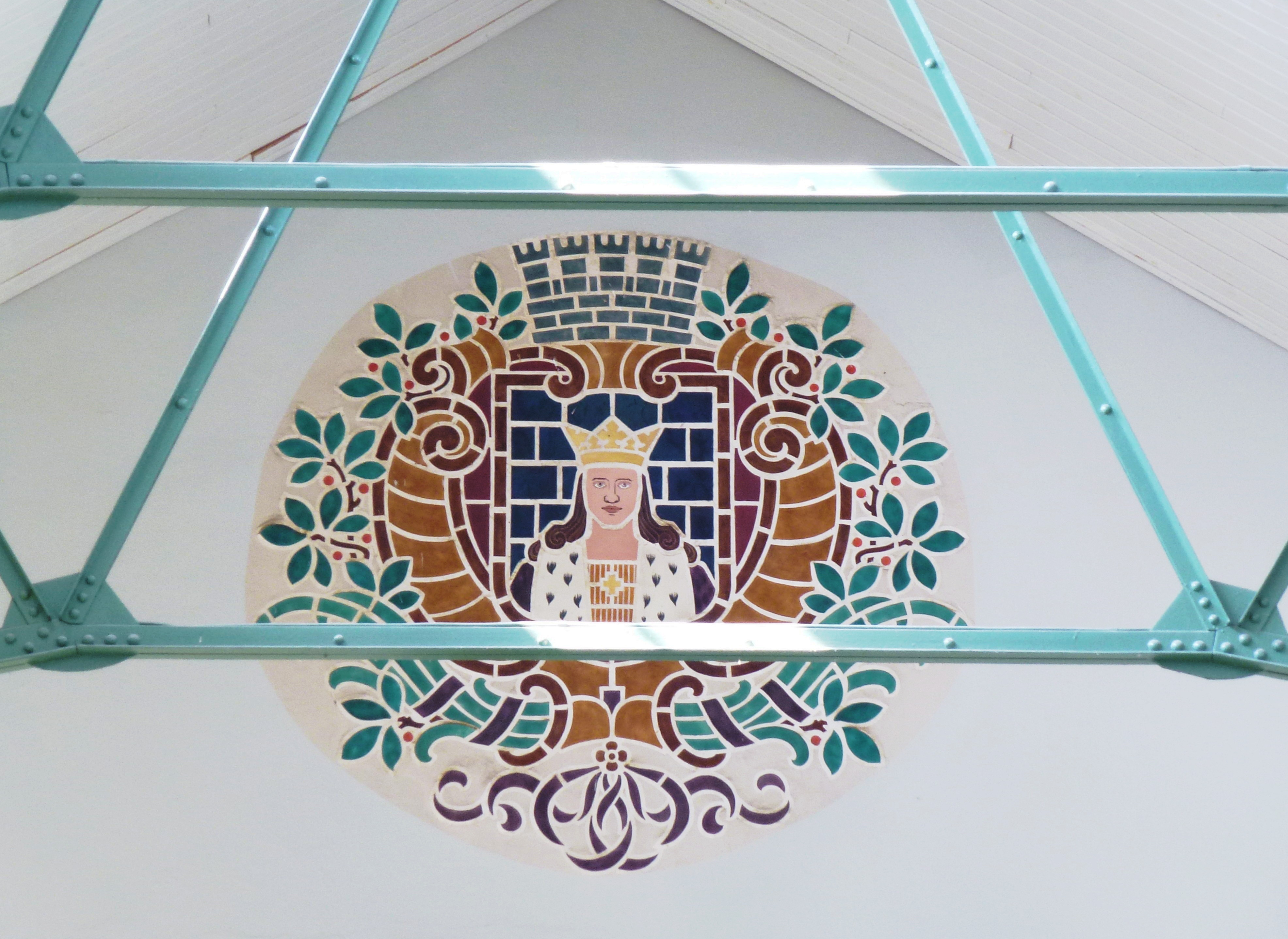 Norsborgs vattenverk maskinhallen, Sankt Erik-motiv på gaveln